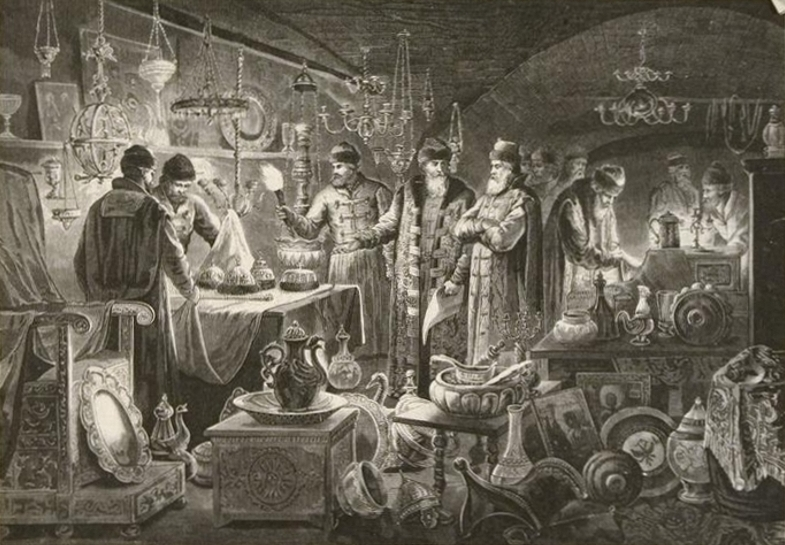 Боярин Федор Иванович Шереметев сдает сохраненные им в Смутное время царские сокровища.